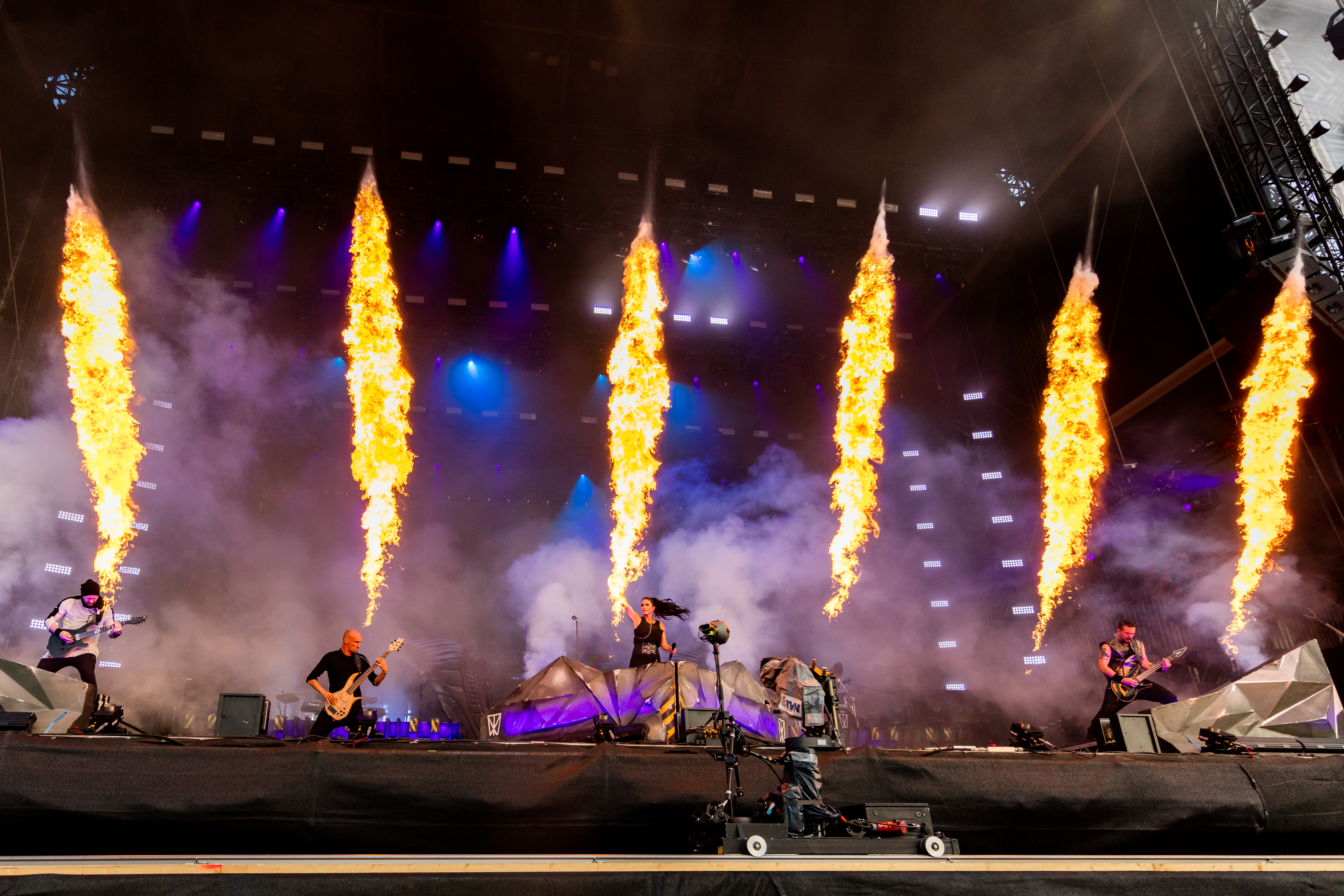 Within Temptation during Wacken Open Air at The Holy Wacken Land, Wacken, Schleswig-Holstein, Germany on 2019-08-02, Photo: Sven Mandel